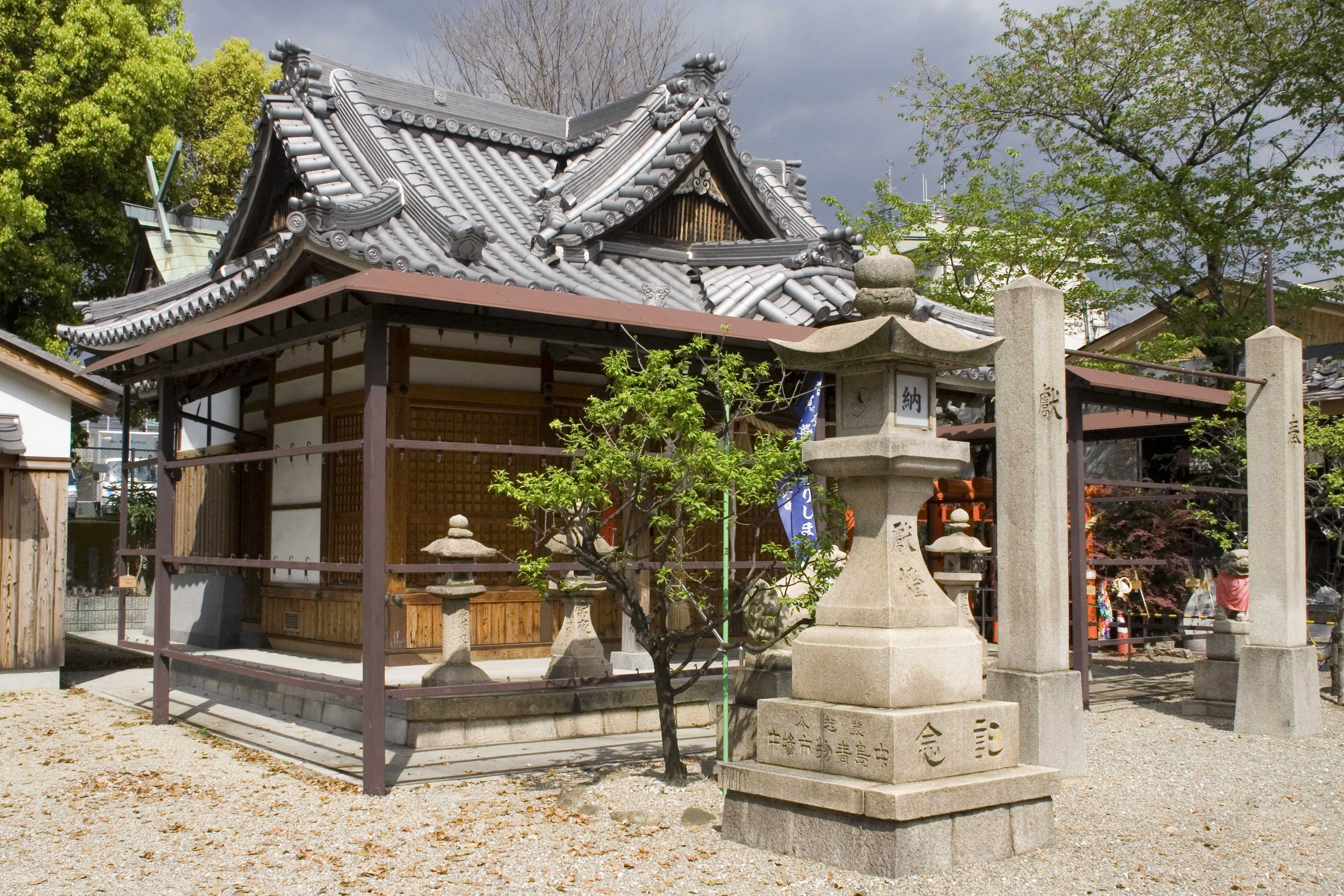 五社神社 (大阪市)